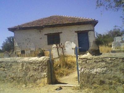 Batisse principale du cimetière d'Erbek avec le tombeau d'Erbek Bey.